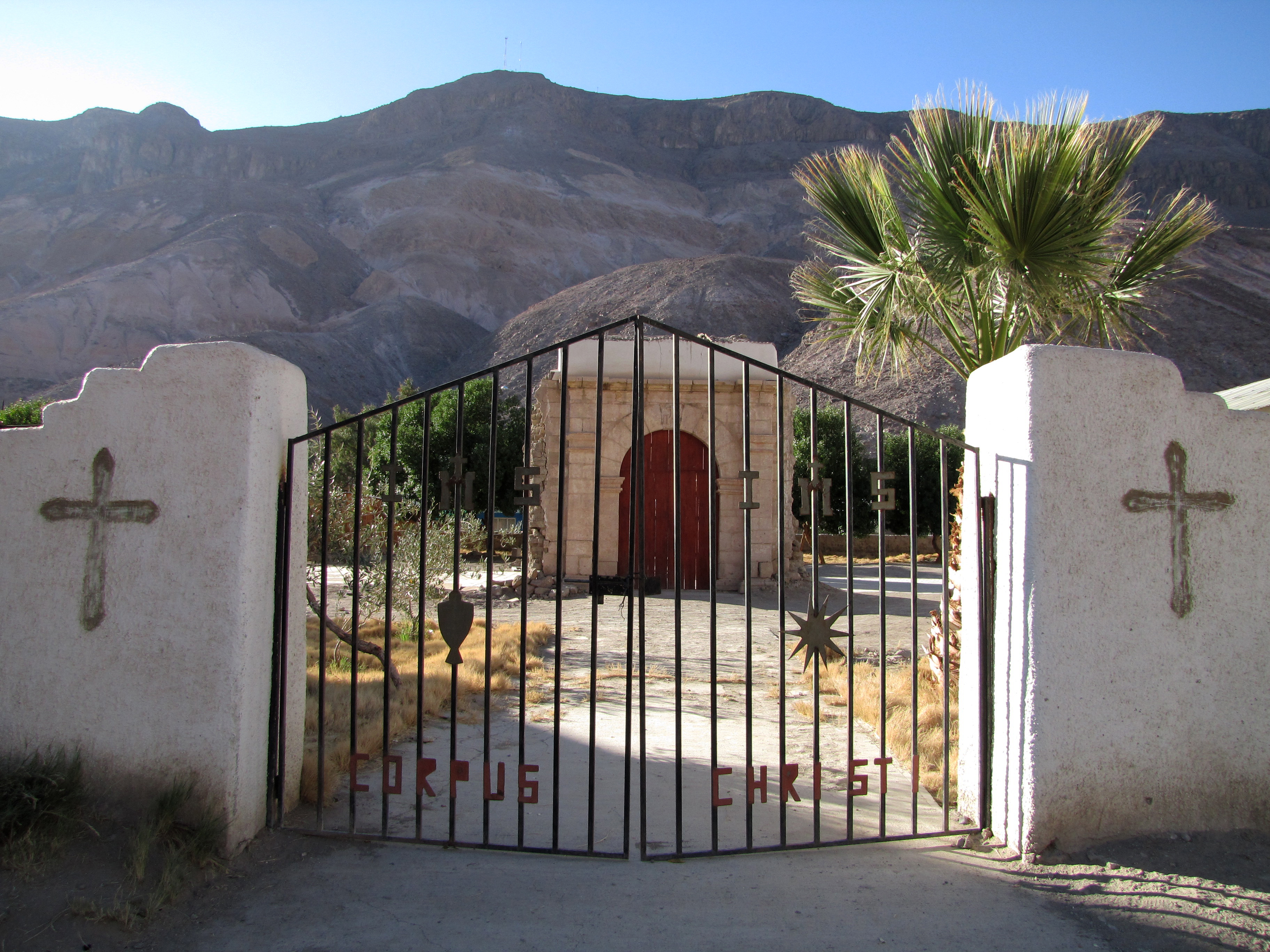 Iglesia de Camiña antes de su restauración This is a photo of a national monument in Chile: 2056